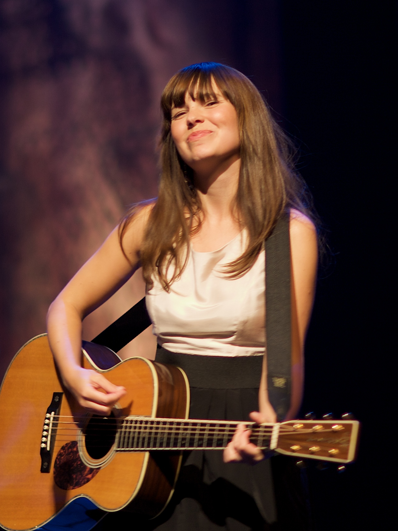 Marit Larsen med Trondheimssolistene i Ibsenhuset